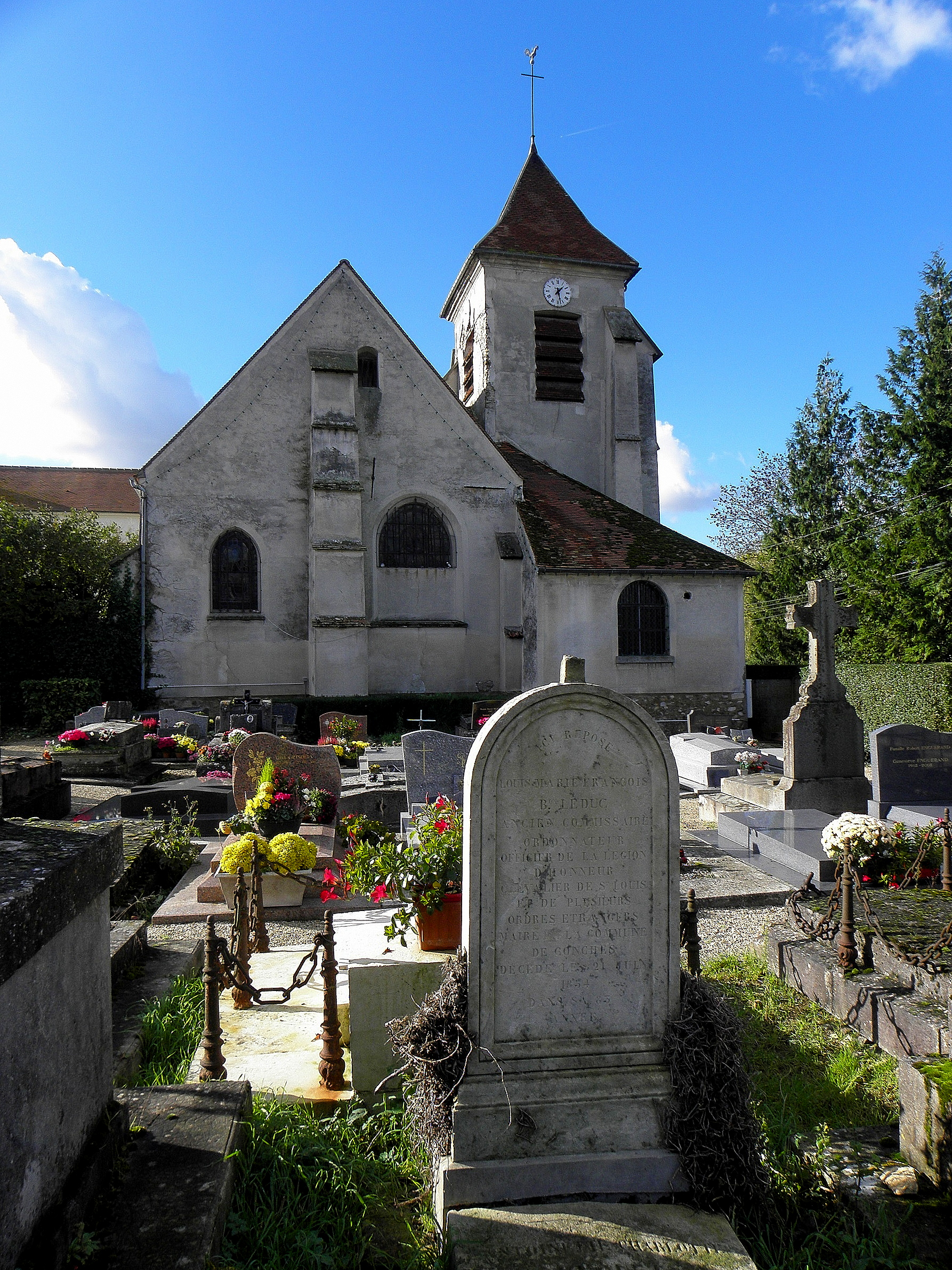 Église Notre-Dame-de-l'Assomption de Conches-sur-Gondoire (77).